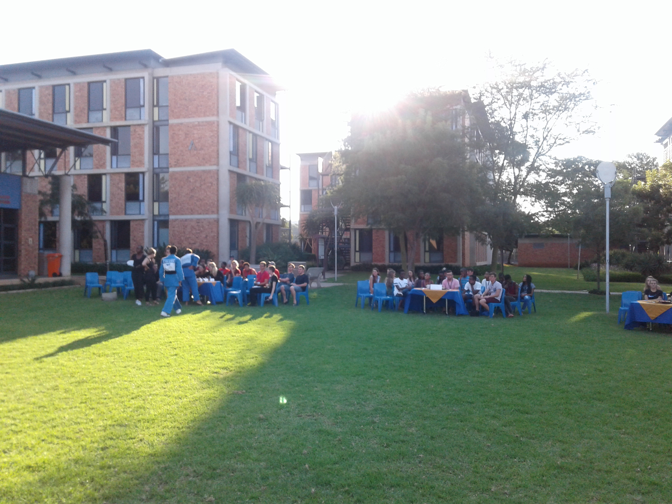 'n Paar van die woonstelblokke in TuksVillage